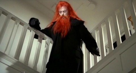 Képkocka a „Júlia és a szellemek” című filmből